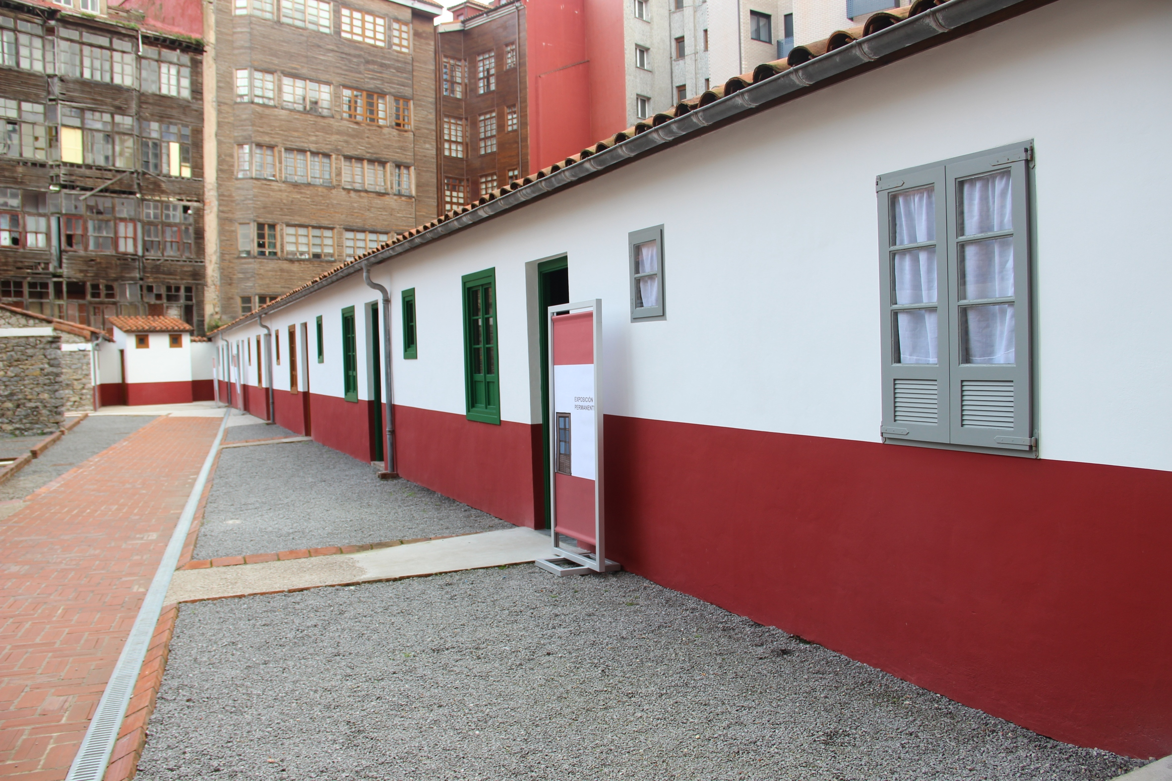 Patio pequeño de la Ciudadela de Celestino Solar, con las viviendas reconstruidas como espacio para exposiciones y actividades.